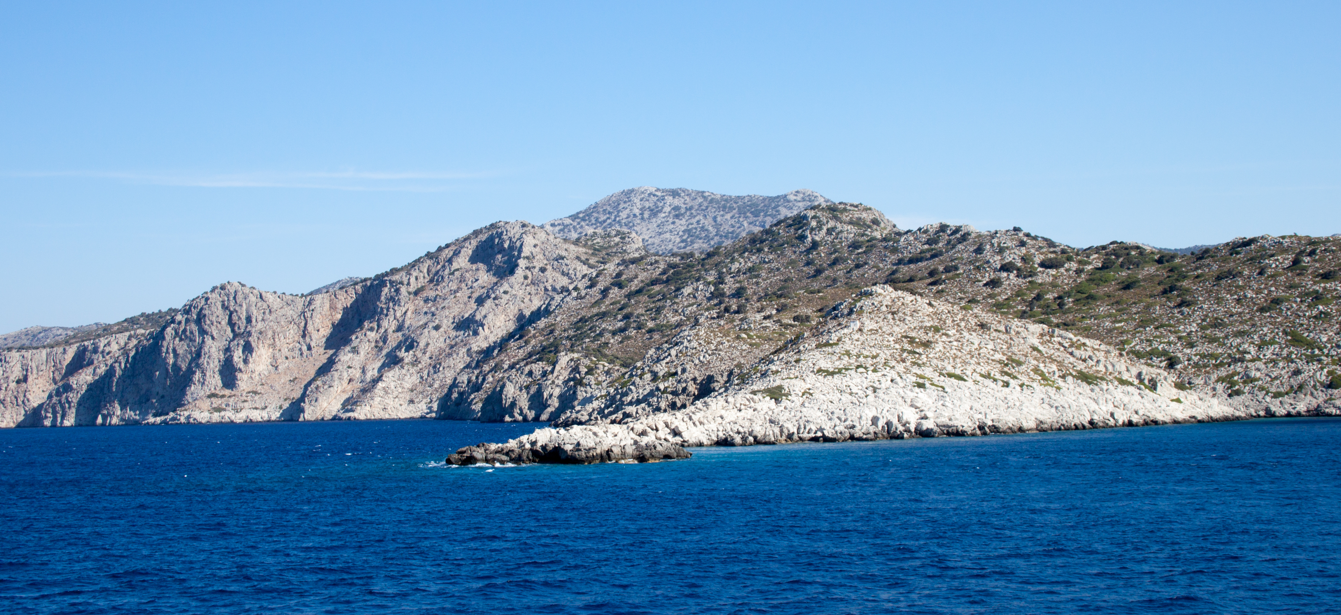 Cape Kara, Turkey